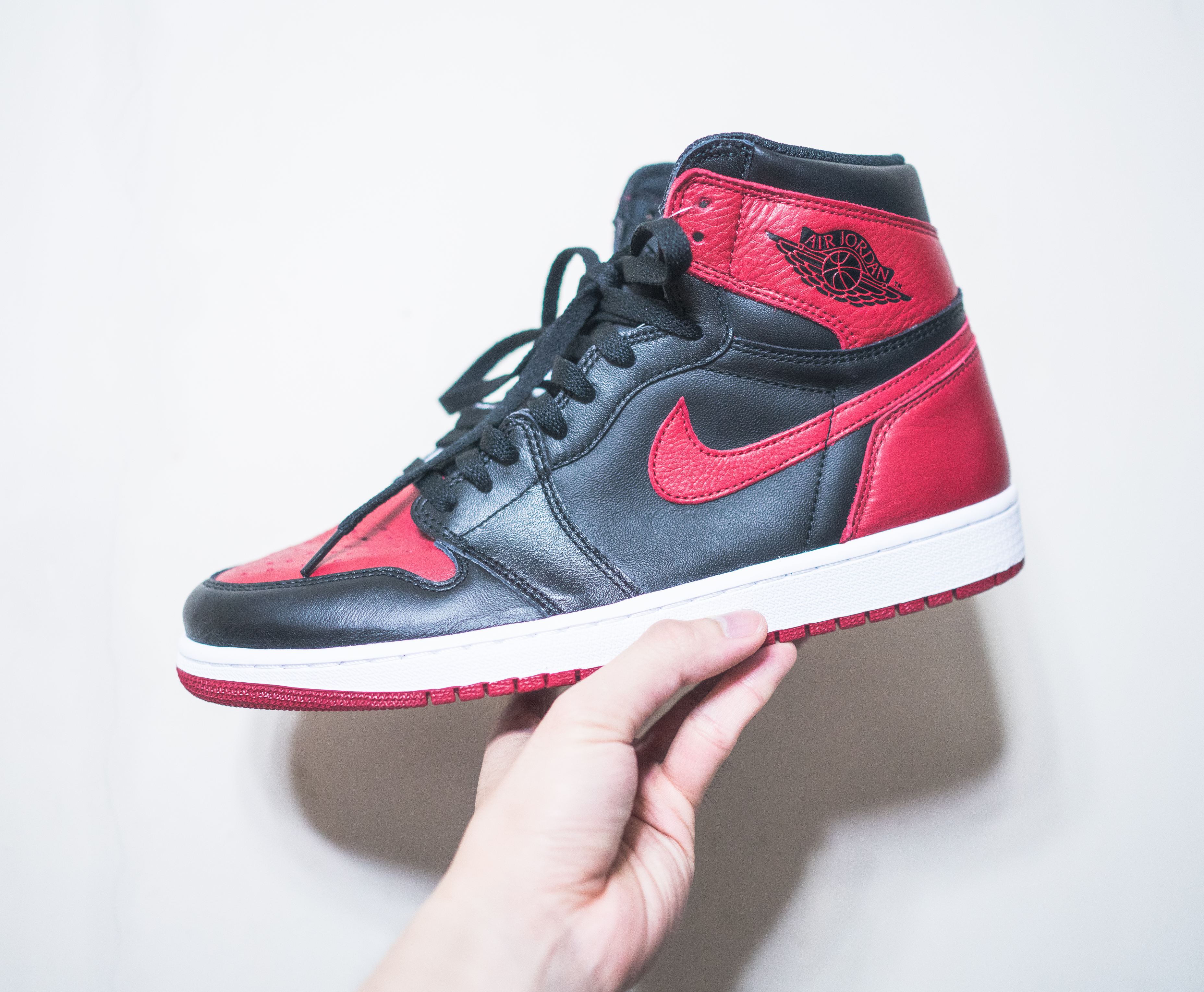 係呢個Jordan 泛濫嘅年代 一個街口應該都搵到十對八對 咁耐以黎，我一對都無買過黎著 回想返小學生年代 曾經係沙田嘅波鞋鋪見到有得買 紅白、黑金嘅Air Jordan 1 我出出入入咁睇左好多次 大佬 Jordan wo 唔識籃球都知乜水喇 無記錯係大約$699 奈可以當時嘅物價實在太貴喇 等下等下，終於比我係2016年等到佢出現 My first Air Jordan "1" 哥買的是童年